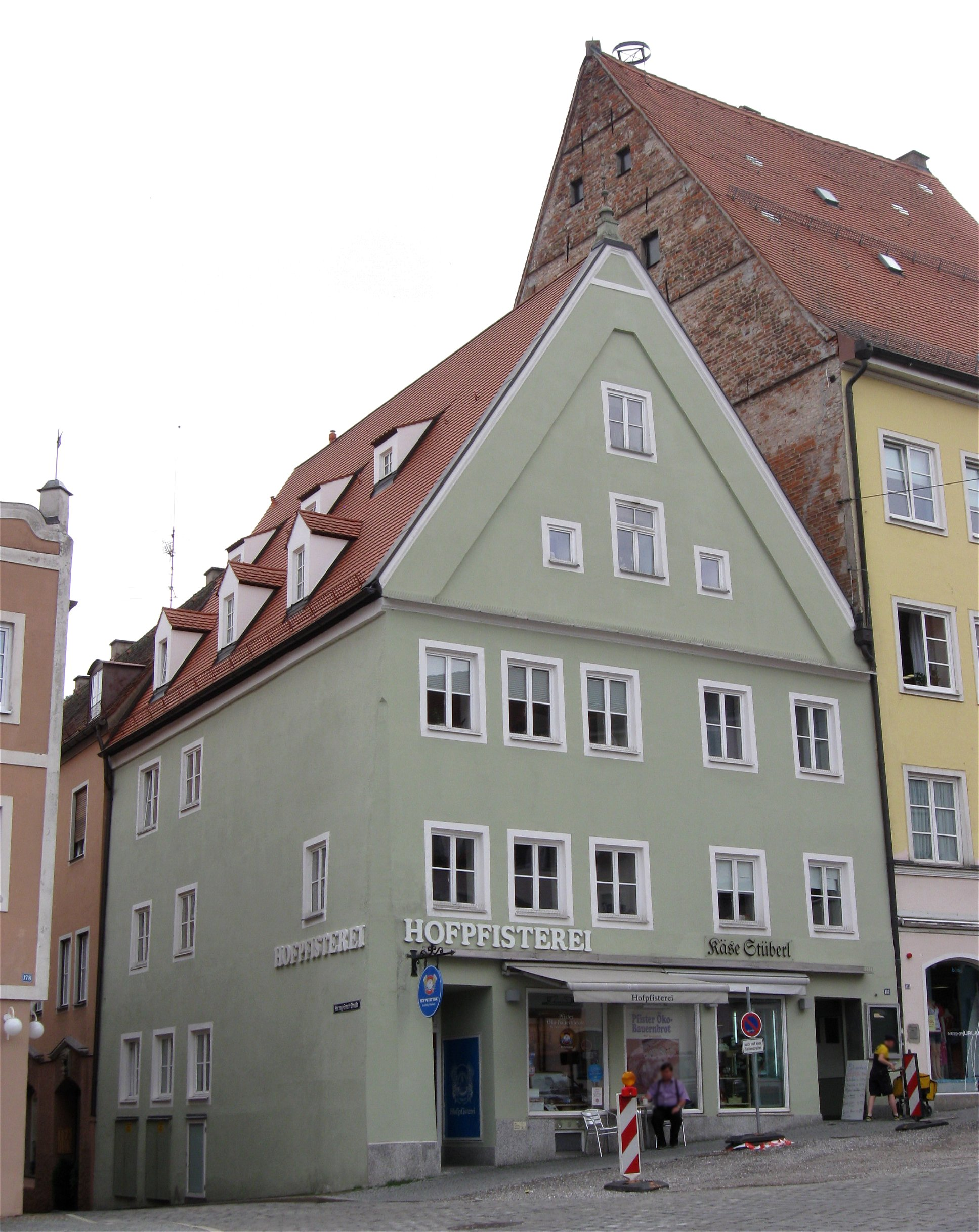 Hauptplatz 180; ehemaliges Handwerkerhaus, dreigeschossiger Eckbau mit Satteldach, ursprünglich zwei Bauten des 13./14. Jahrhundert, zusammengefasst um 1420, erneuert im 18. Jahrhundert, um 1830, 1893 und 1963. D-1-81-130-102